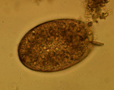 uovo di Fasciolopsis buski. Fonte: Centers for Disease Control and Prevention